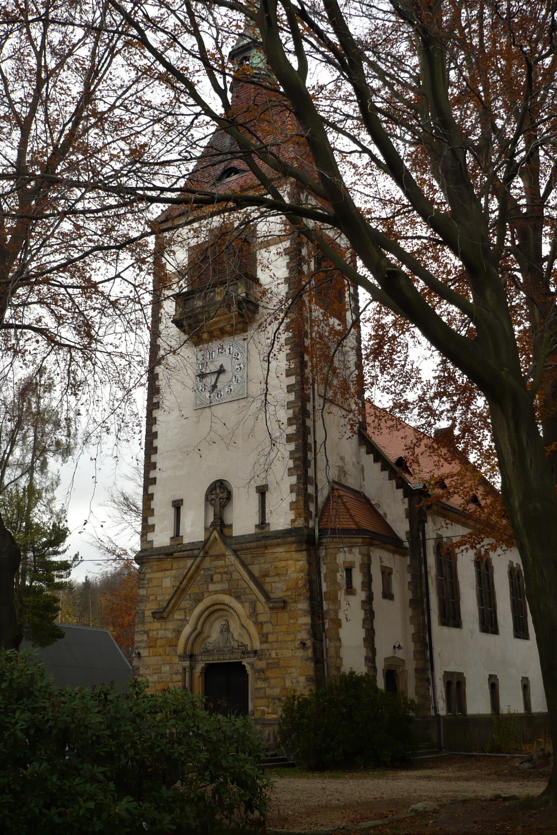 Frýdlant